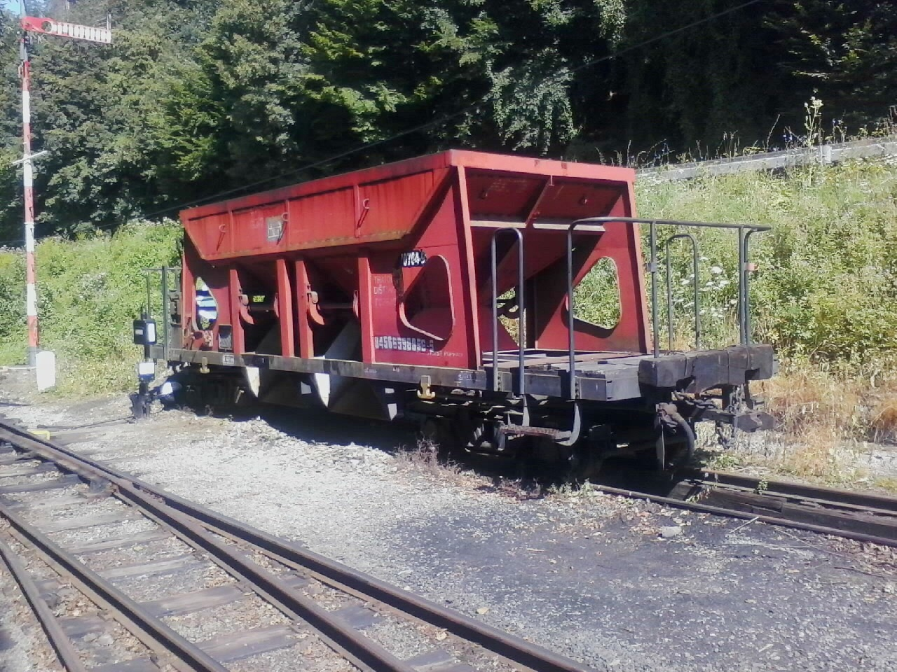 Jediný nákladný vozeň Košickej detskej historickej železnice odstavený v stanici Čermeľ. Vozeň bol z Popradu dovezený pri rekonštrukcii trate v roku 2006.